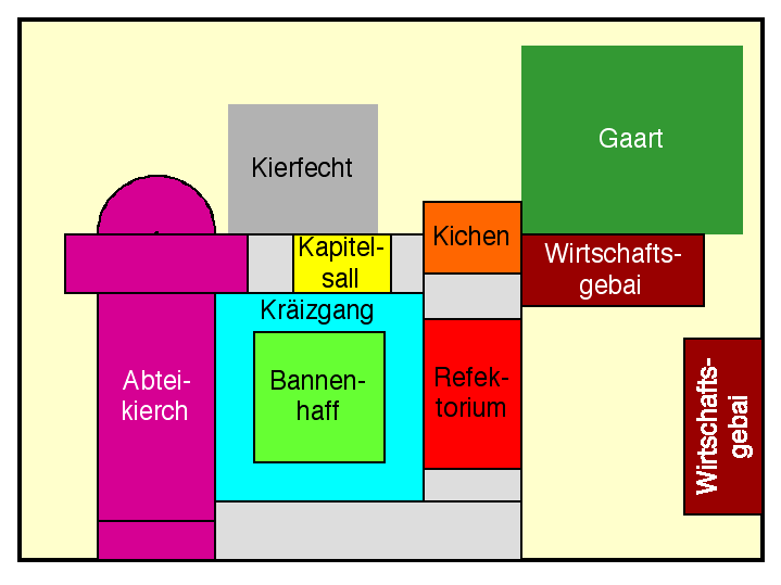 Schematesche Plang vun enger Abtei.